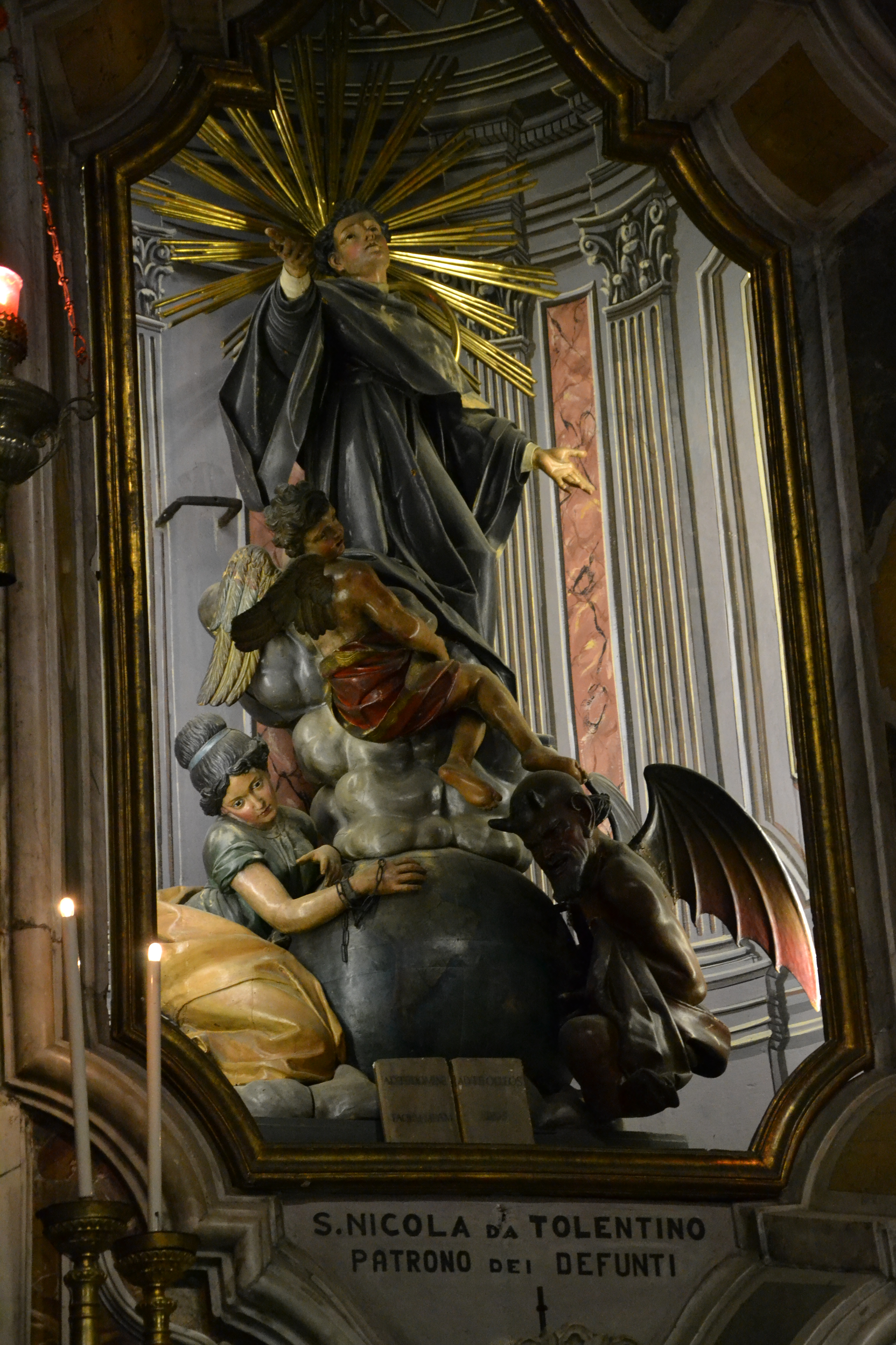 San Nicola da Tolentino, gruppo ligneo settecentesco raffigurante il santo, di Agostino Storace, allievo del Maragliano, Chiesa della Consolazione (Genova)